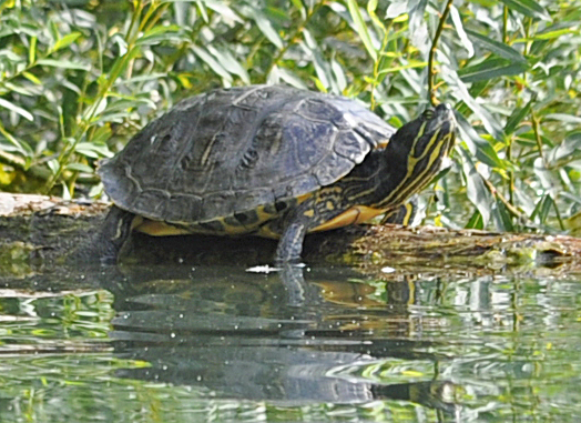 Schildkröte im Rosdorfer Baggersee bei Göttingen, Ostufer, 1.8.2014. Foto: F. Welter-Schultes.